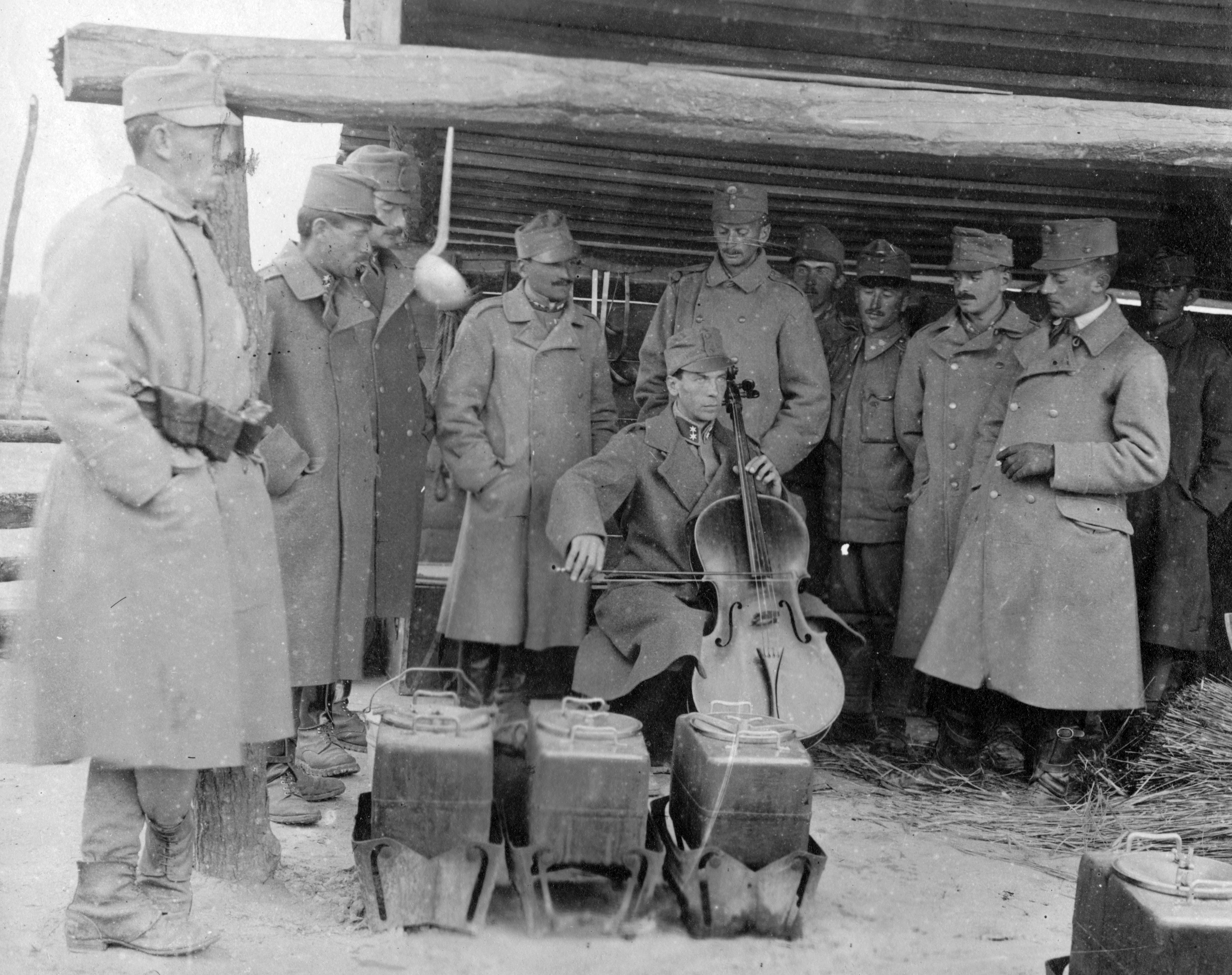 Első világháború, Kerpely Jenő gordonkaművész a fronton. Tags: celebrity, First World War Title: Első világháború, Kerpely Jenő gordonkaművész a fronton.